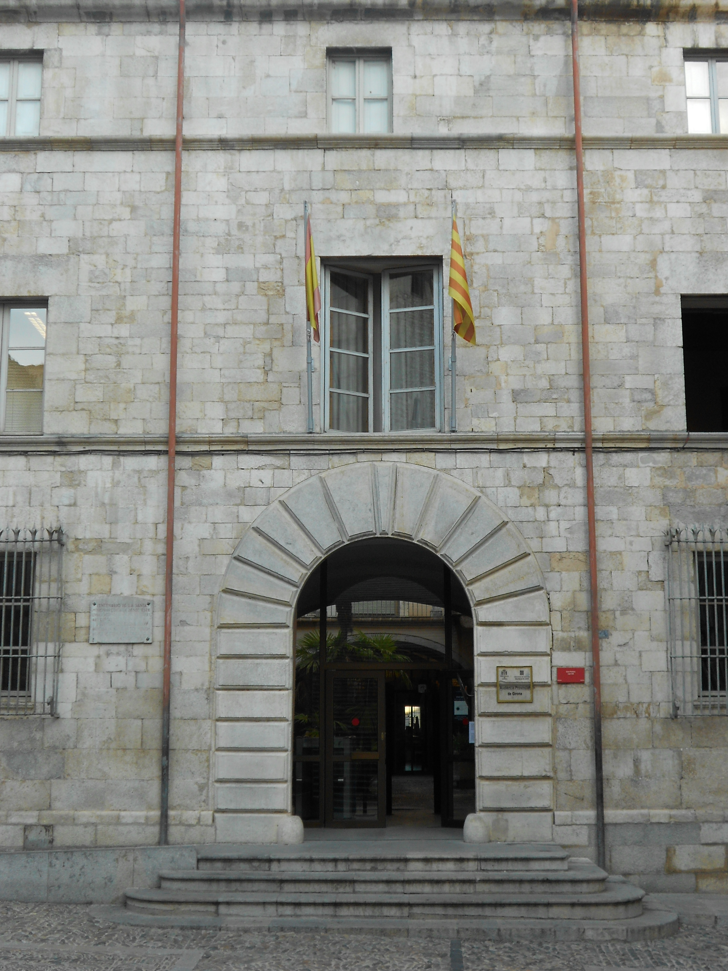 La Casa Pastors de Girona, seu de l'Audiència Provincial entre els anys 1907 i 2012.